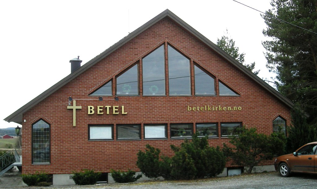 Betel Haga eller Betelkirken ved Auli, Nes i Akershus